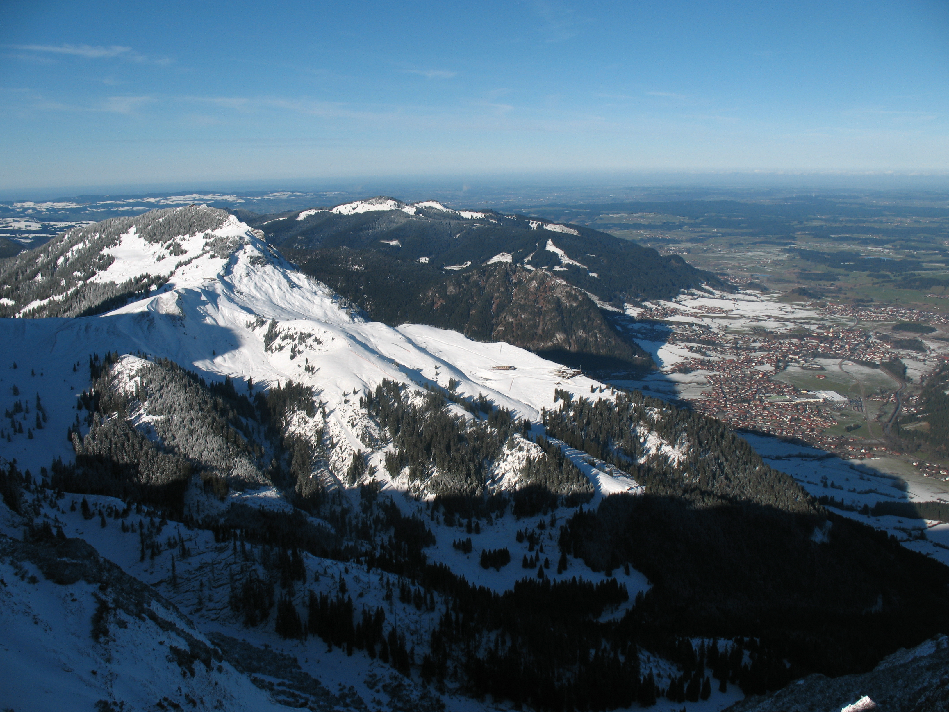 Breitenberg (1838 m) mit Skigebiet und Pfronten (853 m) gesehen vom Brentenjoch (2000 m).